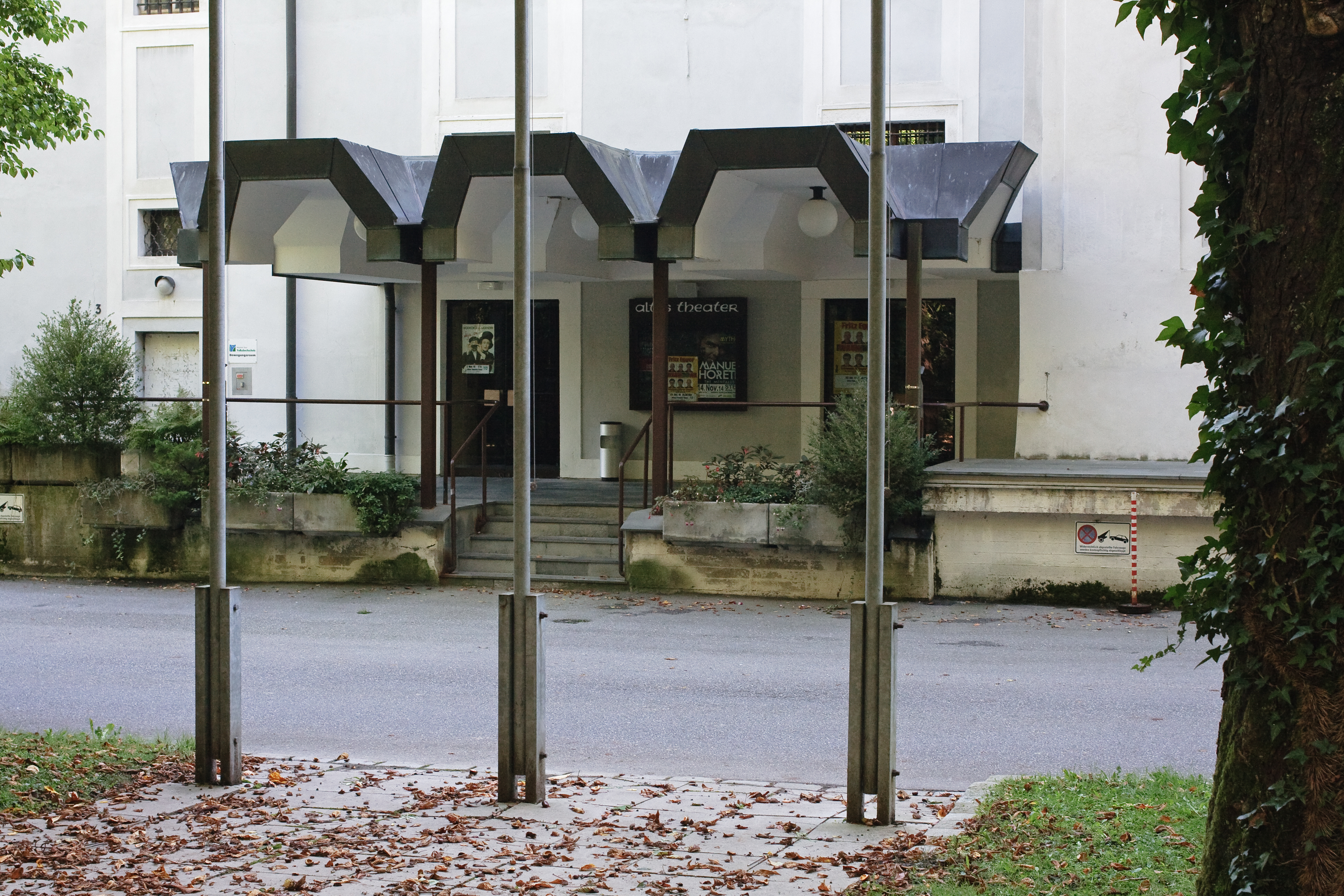 Der Eingang des alten Steyrer Stadttheaters zur Handel-Mazzetti-Promenade.